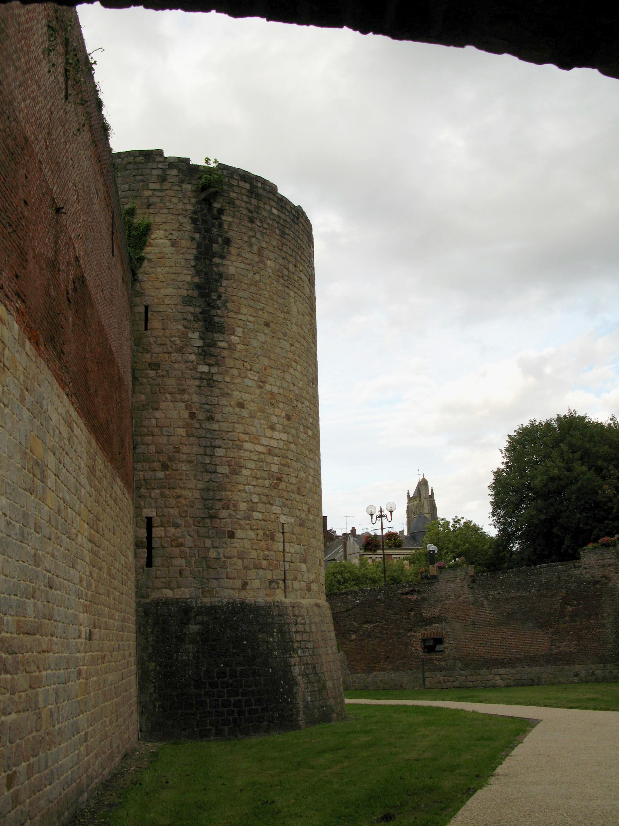 Péronne (Somme, France) - Fossé du château avec vue vers église.